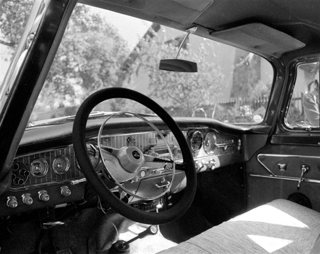 Samochód GAZ-13 Czajka